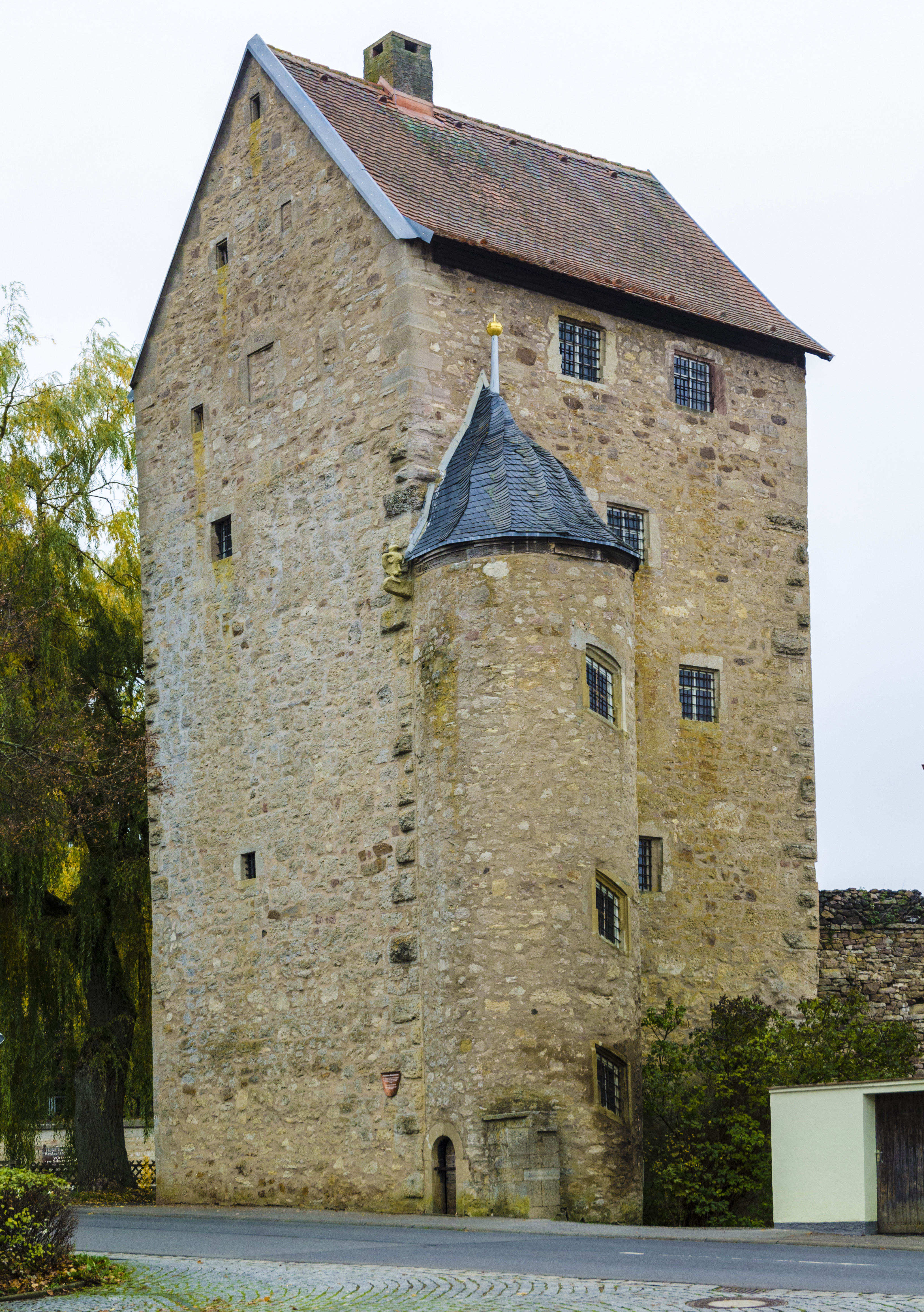 Stadtmauer Flandungen